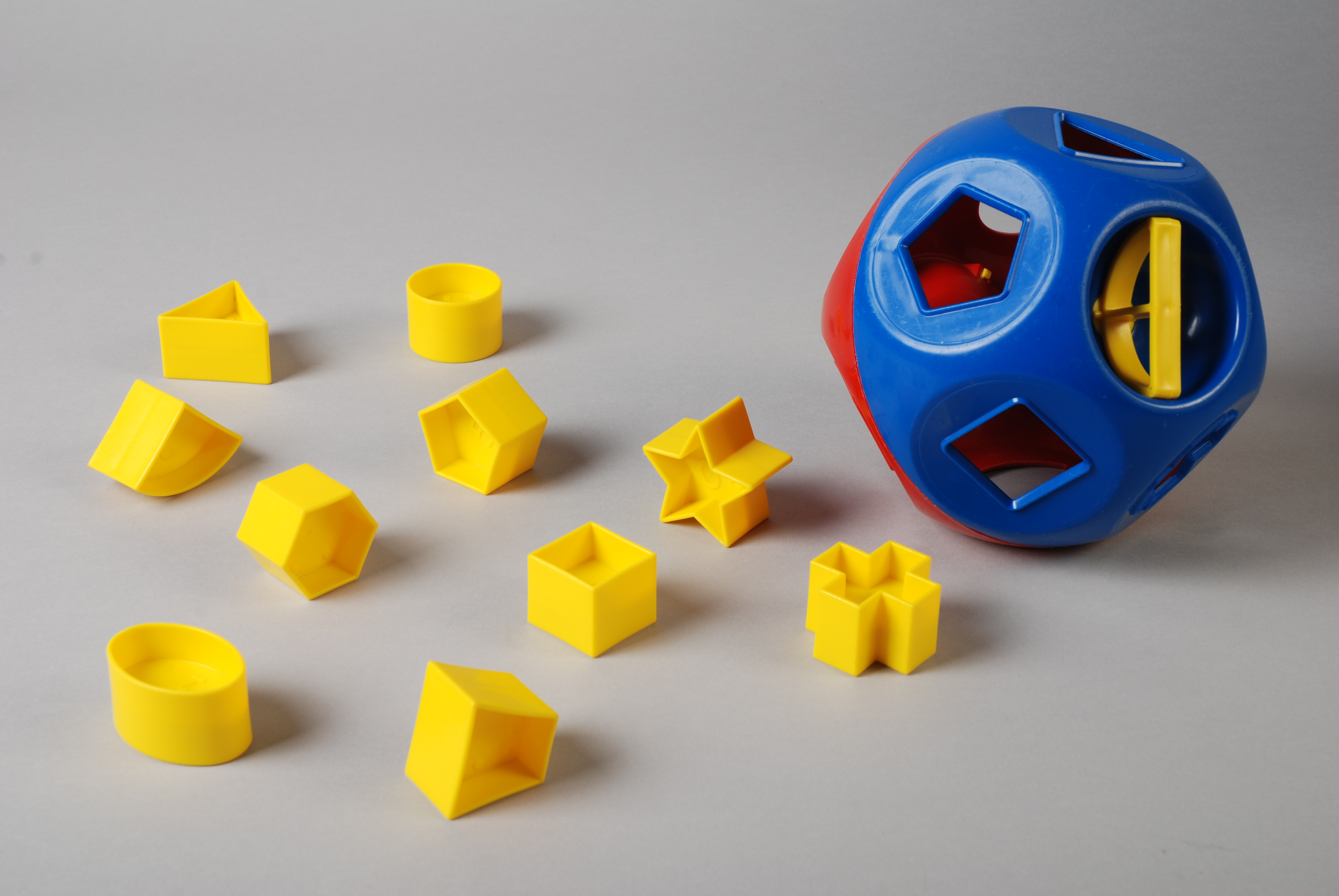 Objectgegevens Titel: Plastic vormenstoof of puzzelbal van “Tupperware Toy” Beschrijving: Vormenstoof. Gefacetteerde bal met twaalf vlakken, waarvan tien vlakken met de omtrek weergegeven van een van de gele vormen in de bal. Twee vlakken herbergen een verzonken trekstang om de bal te kunnen openen. Elastieken sluiting. Rood en blauw. Gemerkt. Trefwoorden: puzzel, speelgoed, ontspanningsmiddel Opschrift / merk: Naast de trekstangen: "Tupperware Toy t.m.". Vervaardiger: Tupperware Ltd. Plaats vervaardiging: Verenigde Staten Datering: 1970 - 1974 Technieken: gegoten Materiaal: plastic, kunststof, elastiek Afmetingen: (cm) hg 14,1 / dm 15,5 Associatie: kind, peuter, kleuter, jongen, meisje, spelen, puzzelen Inventarisnr: Museum Rotterdam 83212